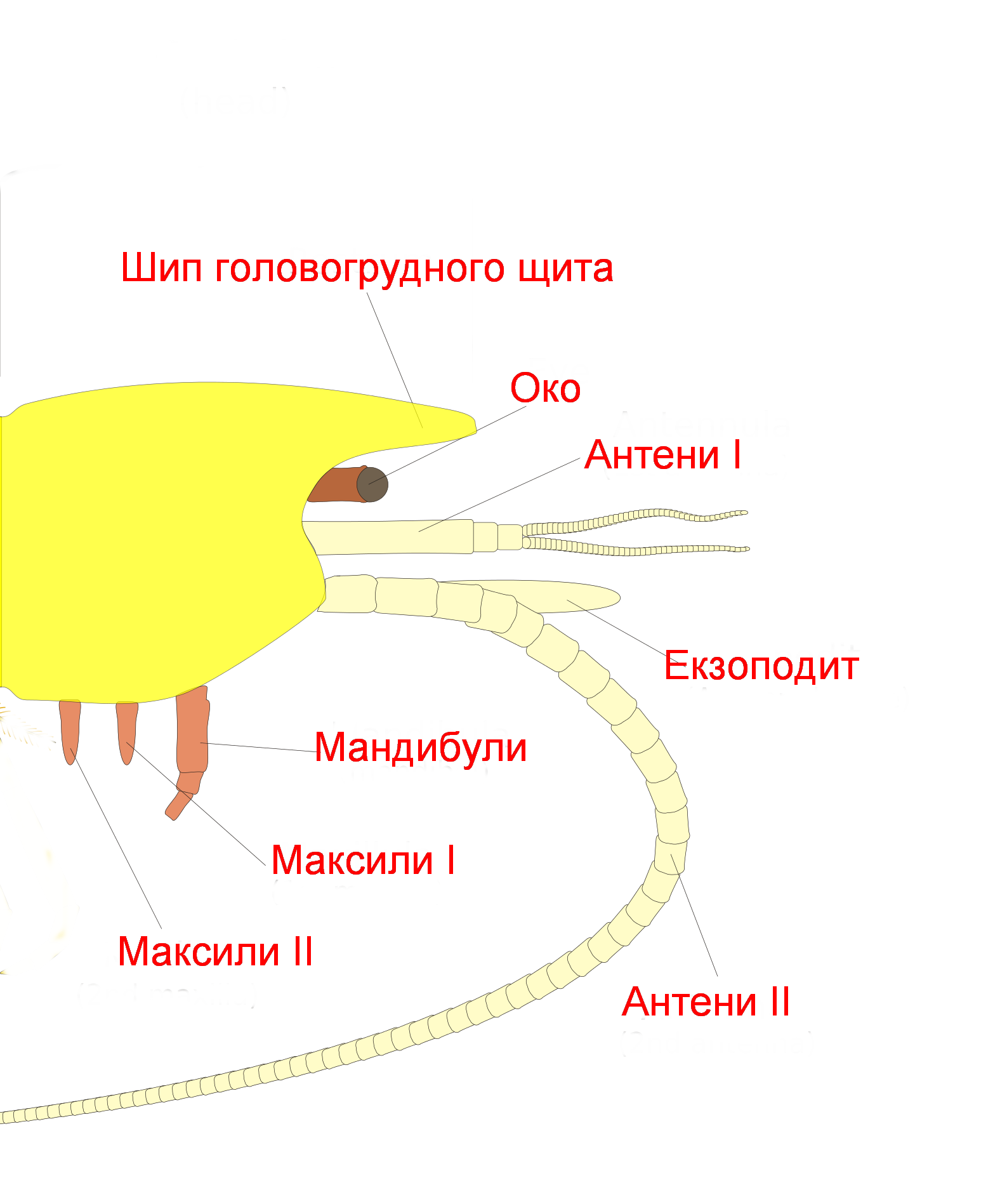 Малюнок, що схематично зображує зовнішню будову голови ракоподібних підкласу Malacostraca